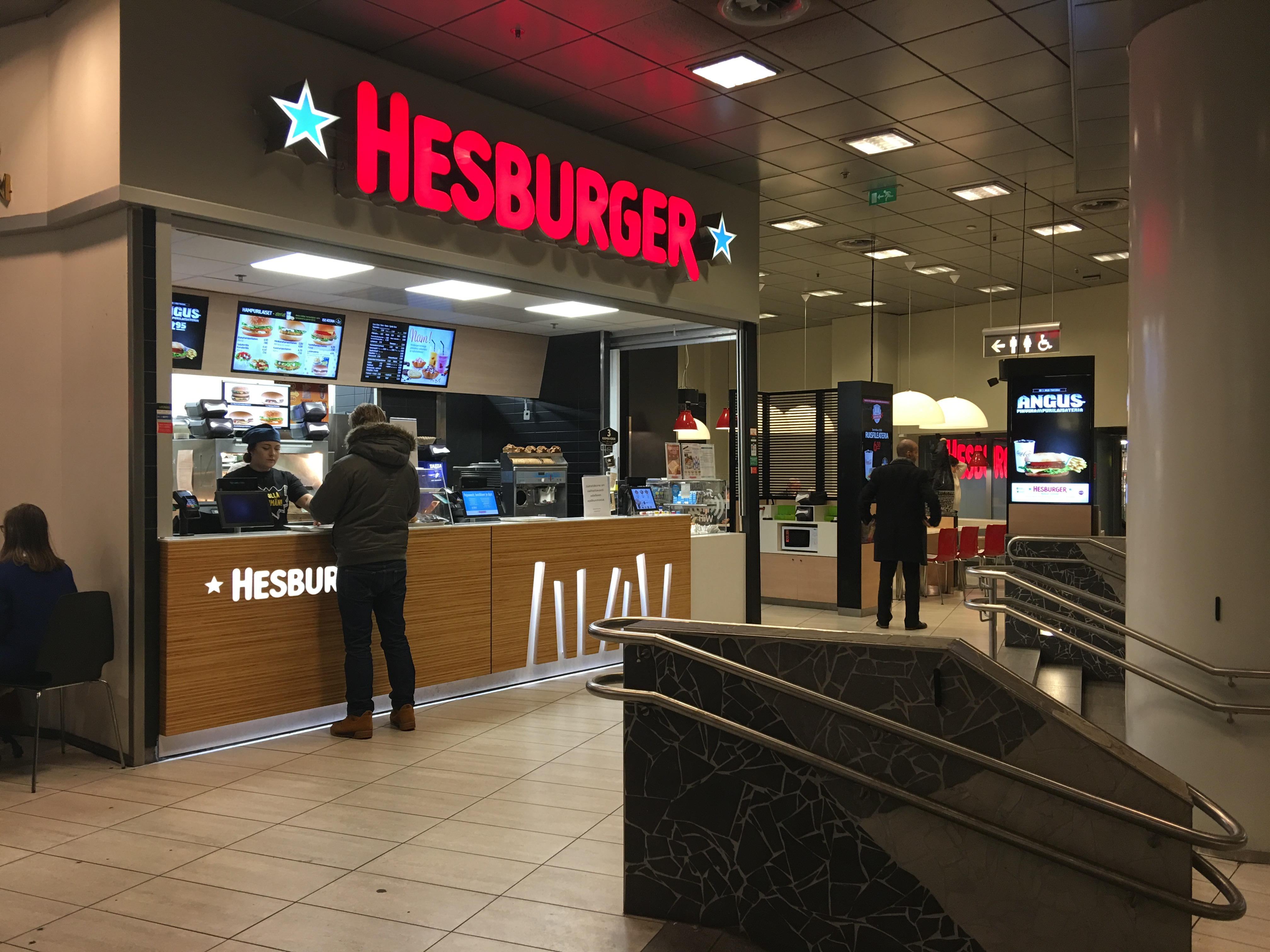 Hesburger Helsingin yliopiston metroasemalla.